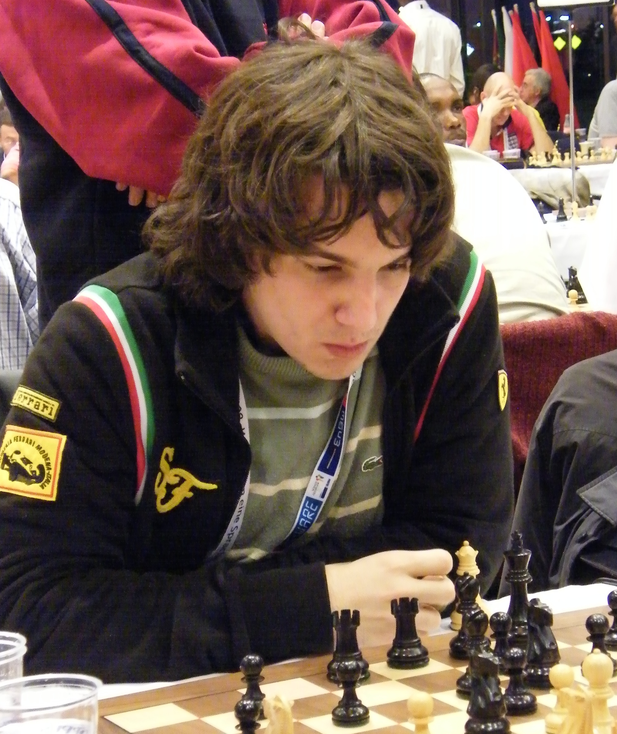 GM Axel Bachmann bei der 38. Schacholympiade in Dresden 2008